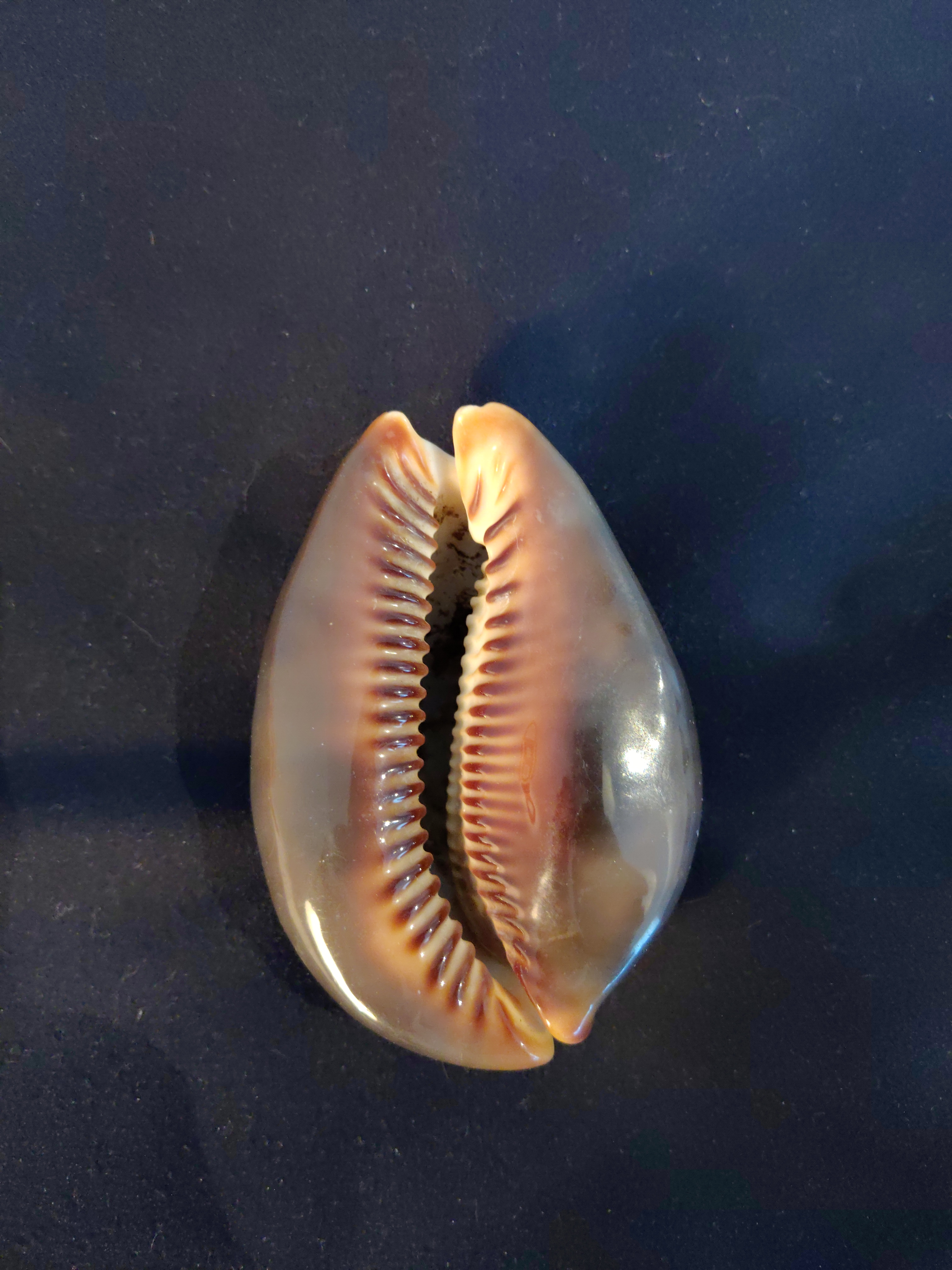 Framsida av Mauritia Mauritiana